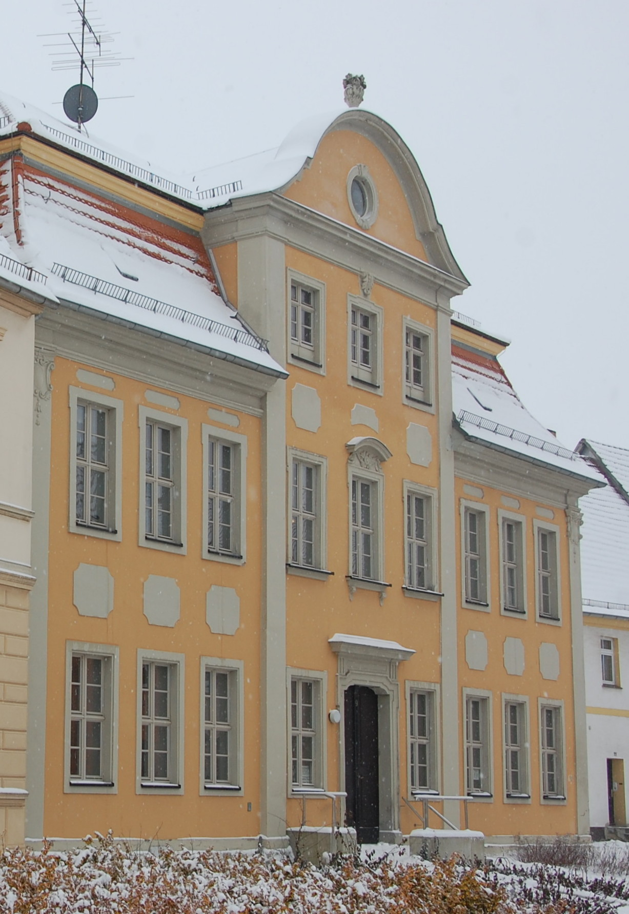 Haus Hohe Straße 12 in Prettin